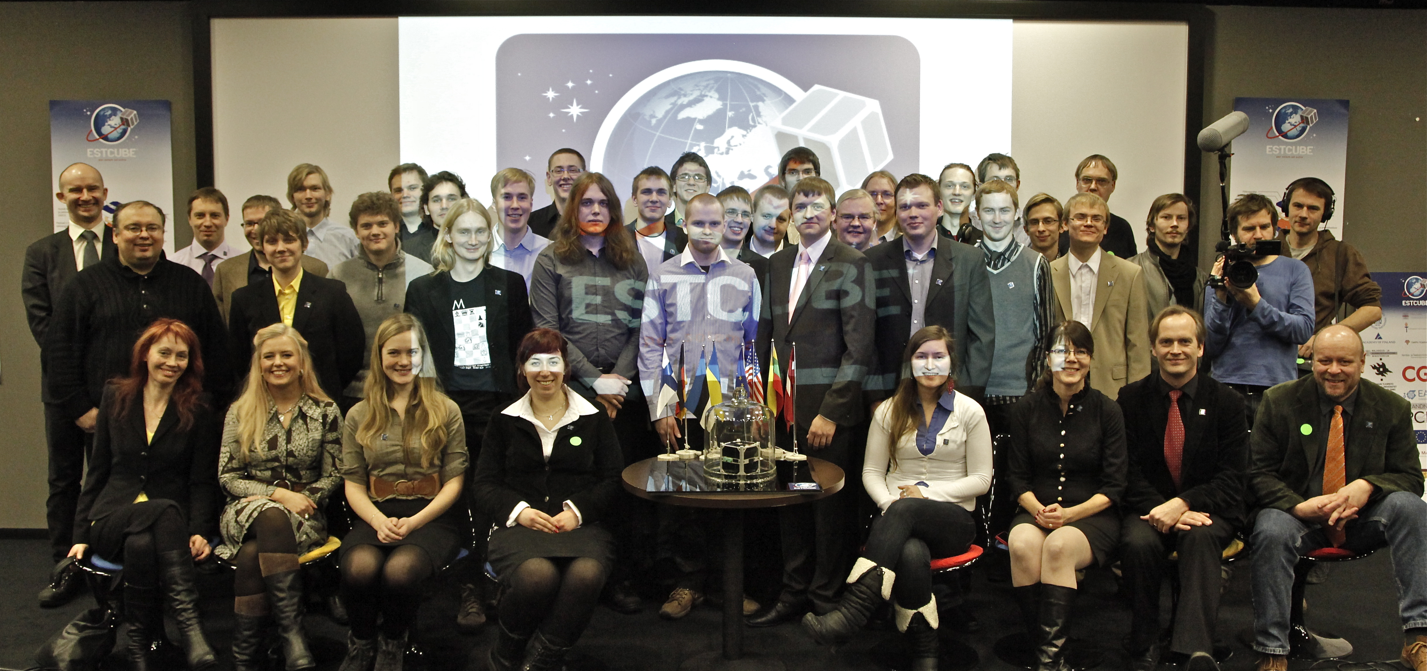 ESTCube-1 esitlus Tallinna teletornis.